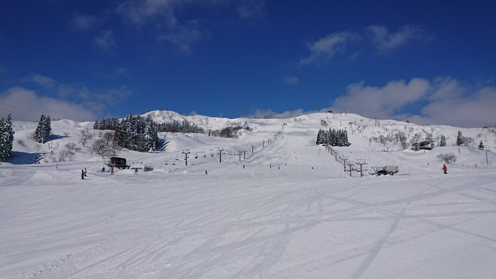 ムイカスノーリゾート センターロッジ付近から中腹～上部を望む 2018年2月撮影